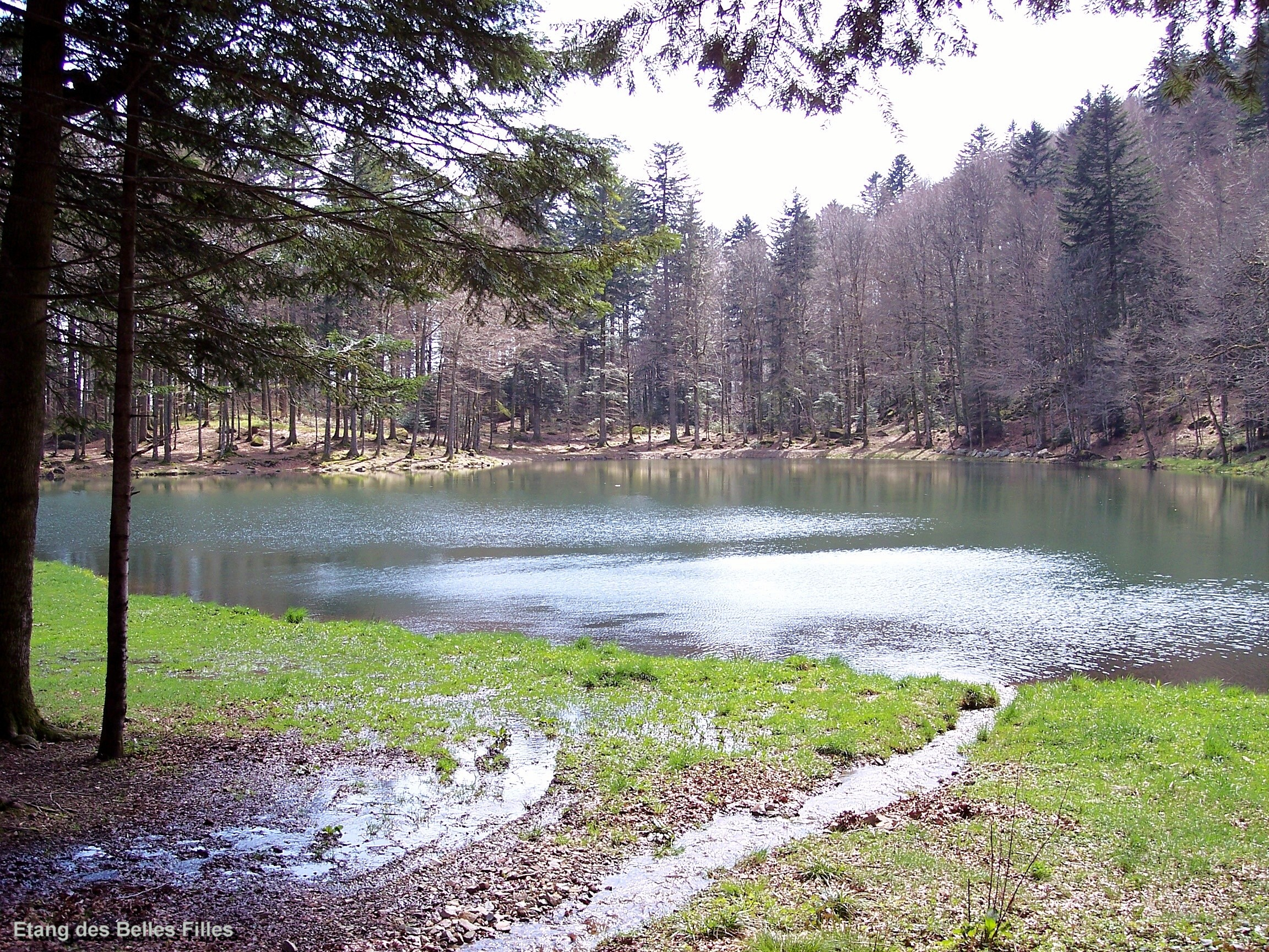 Etang des belles filles. Massif du ballon d'Alsace.